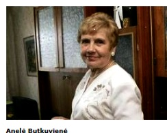 Anelė Butkuvienė - Šidiškytė